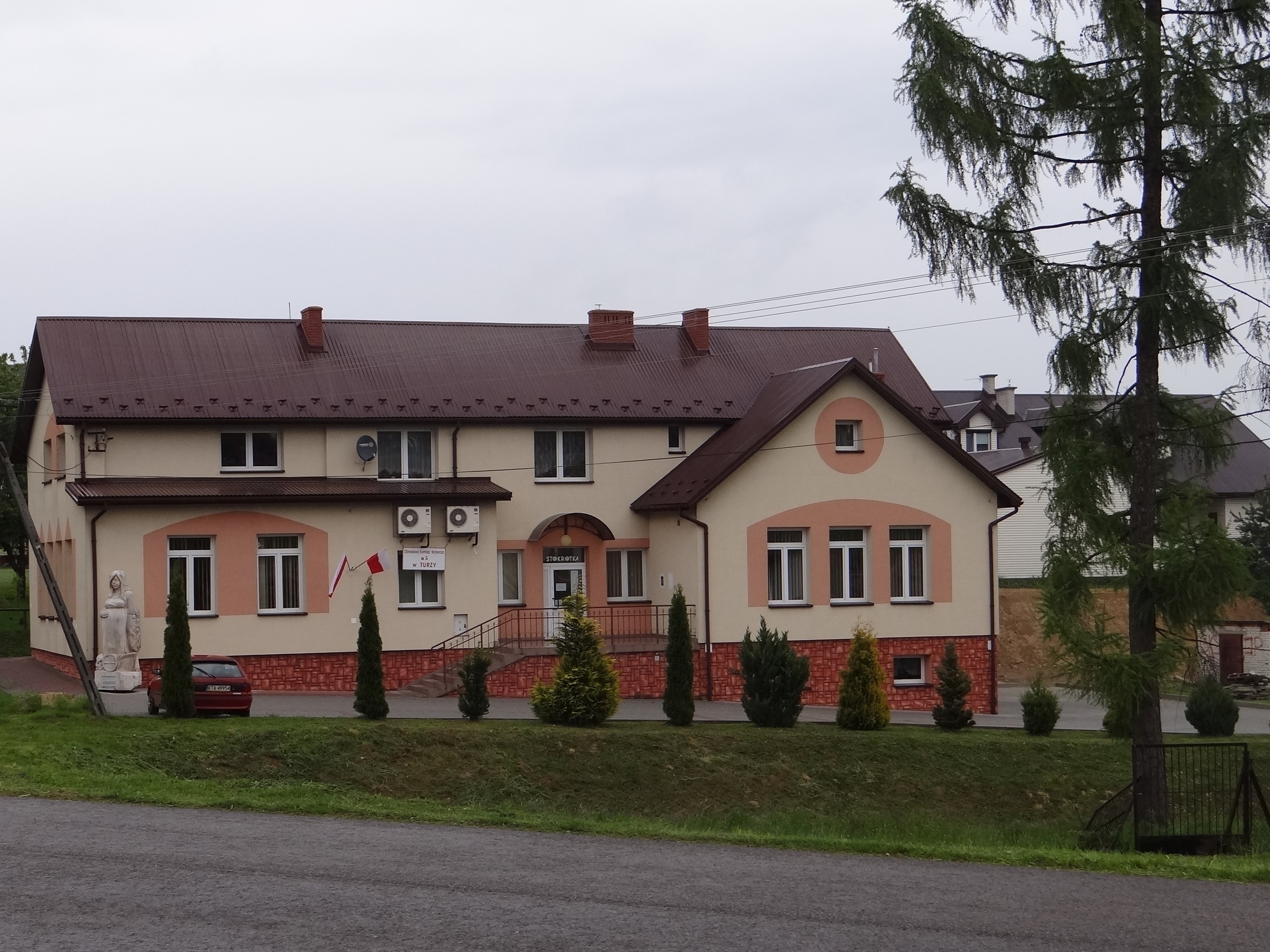 Turza